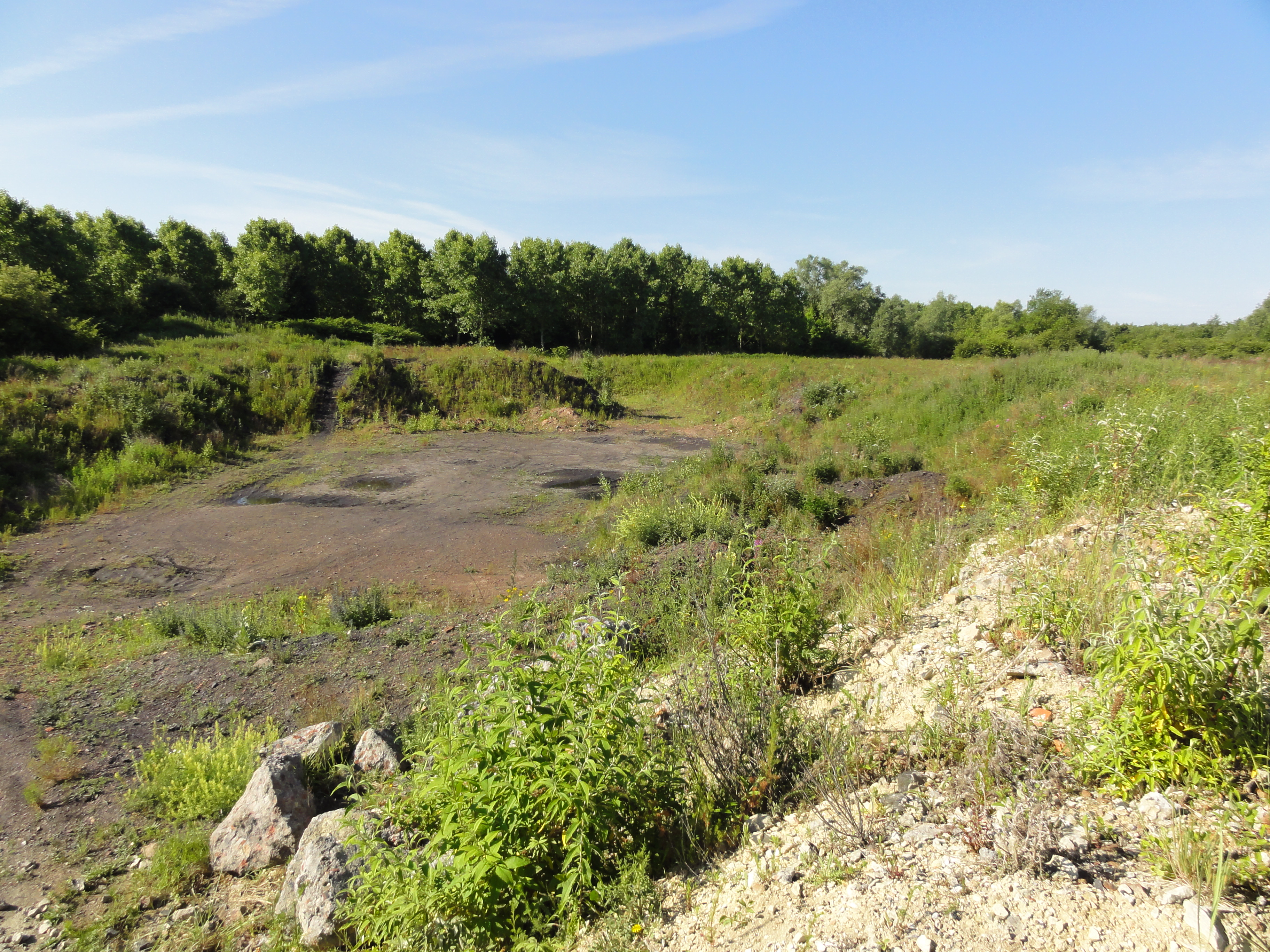 Terril n° 149A dit Saint Mark Nord, considéré disparu, Fosse Saint Mark de la Compagnie des mines d'Anzin, Escaudain, Nord, Nord-Pas-de-Calais, France.